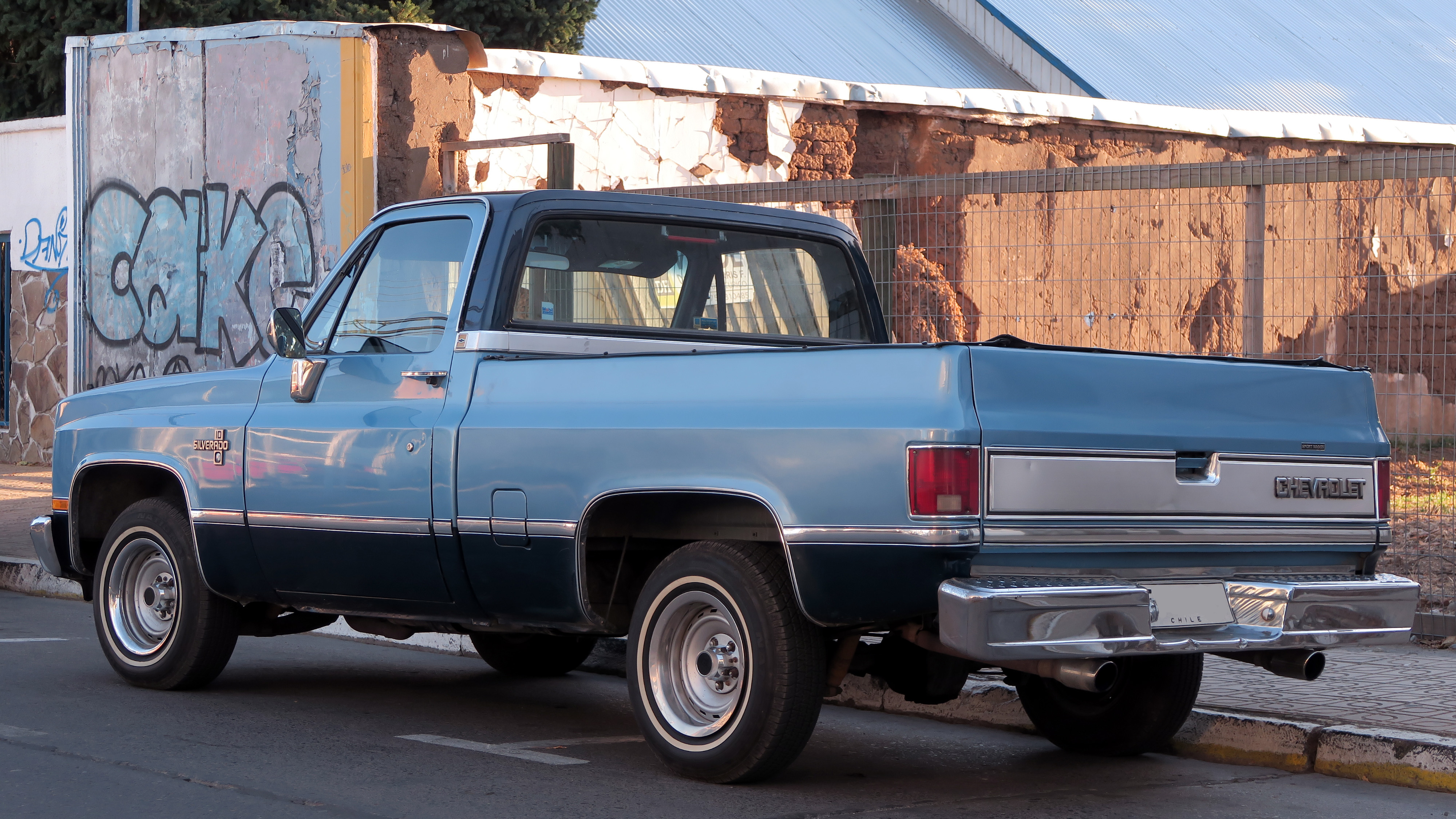 Chevrolet C-10 Silverado 1987